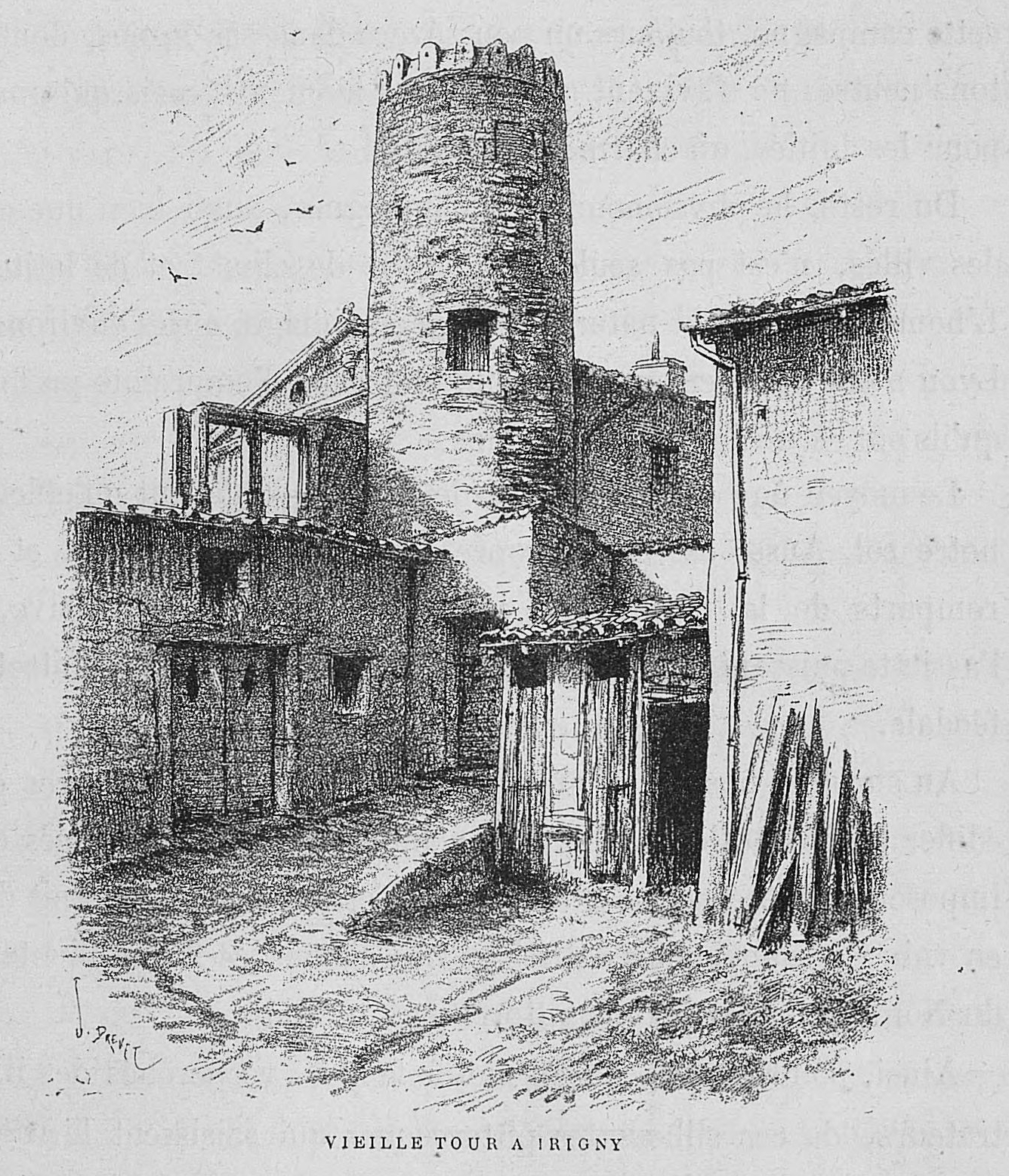 Aux environs de Lyon / Monsieur Josse ; préface de M. Coste-Labaume ; édition illustrée de 250 dessins de J. Drevet.